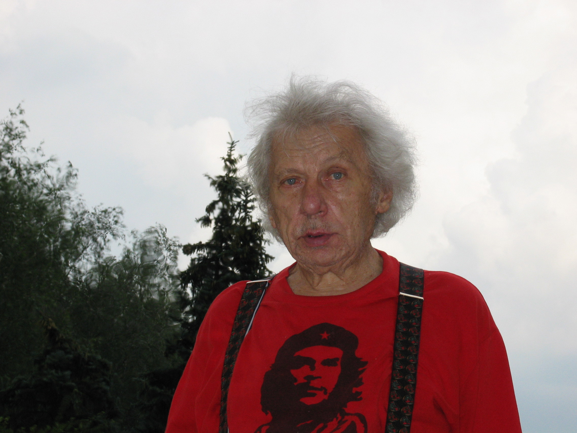 Чанышев Арсений Николаевич / Arseny Nikolayevich Chanyshev